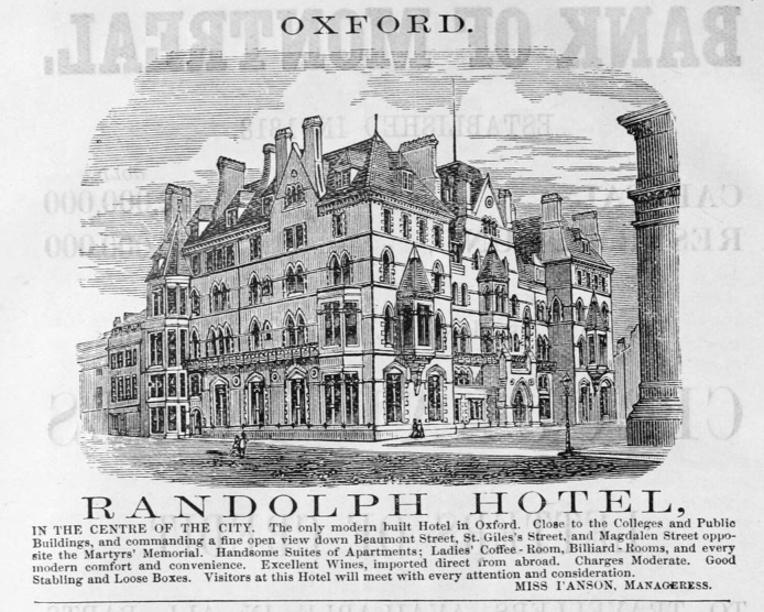 Hotel advertisement